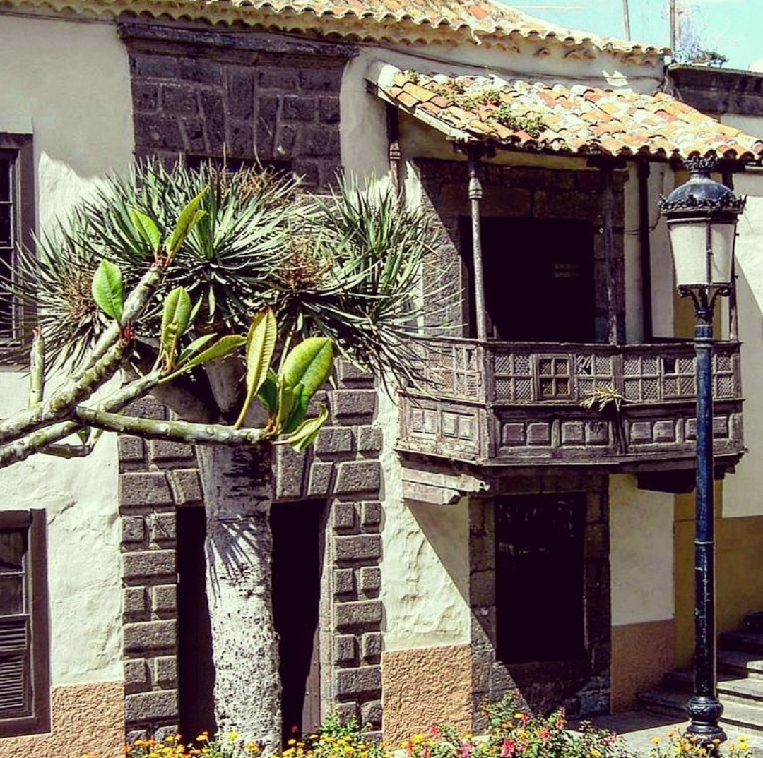 Casa Quintana, casa señorial del siglo XVI de Guía de Gran Canaria